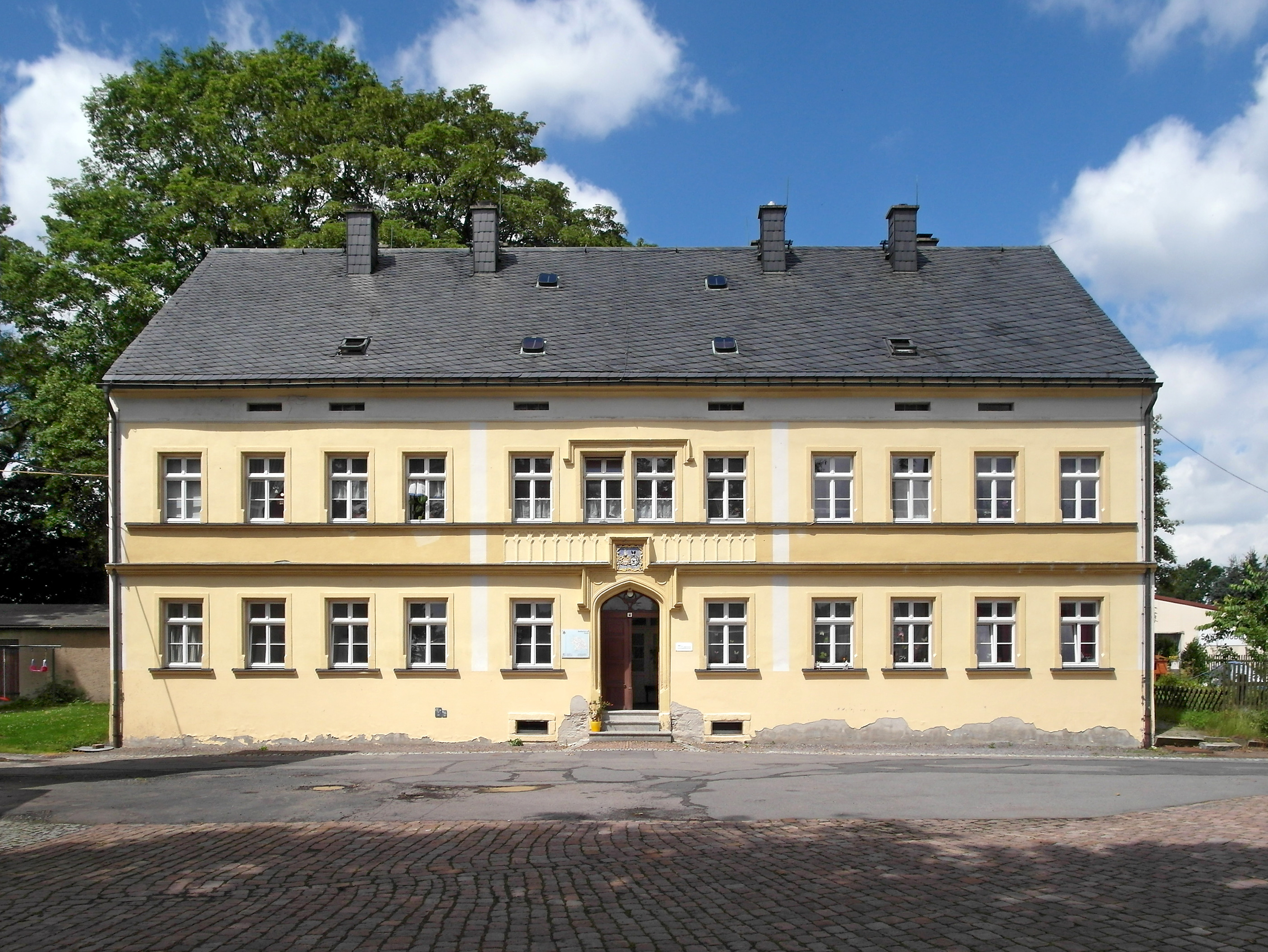 18.07.2016 09619 Sayda: Herrenhaus Schloßweg 4. 1289 wird erstmals eine Burg Sayda erwähnt, auf deren Grundmauern 1584 ein Vorwerk entstand. Ab 1747 hielt sich ein Vitzthumisches Kürassierregiment in Sayda auf. Rittmeister Vitzthum von Eckstädt besaß das Schloß in Sayda mehrere Jahrzehnte. 1877 brannte das alte Vorwerk ab und man erbaute ein neues Gebäude gegenüber dem alten, so wie es der heutige Zustand zeigt. Wappen u. Inschrift (vorher am alten Gebäude angebracht) über dem Portal erinnern an J. E. Vitzthum von Eckstädt und seine Frau M. E. Vitzthum von Eckstädt geb. Hahn. Bis 1951 diente dann dieses Gebäude dem Gesundheitswesen und heute als Wohnhaus. [SAM7017.JPG]20160718400DR.JPG(c)Blobelt